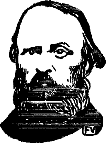 Portrait de Fortuné Henry